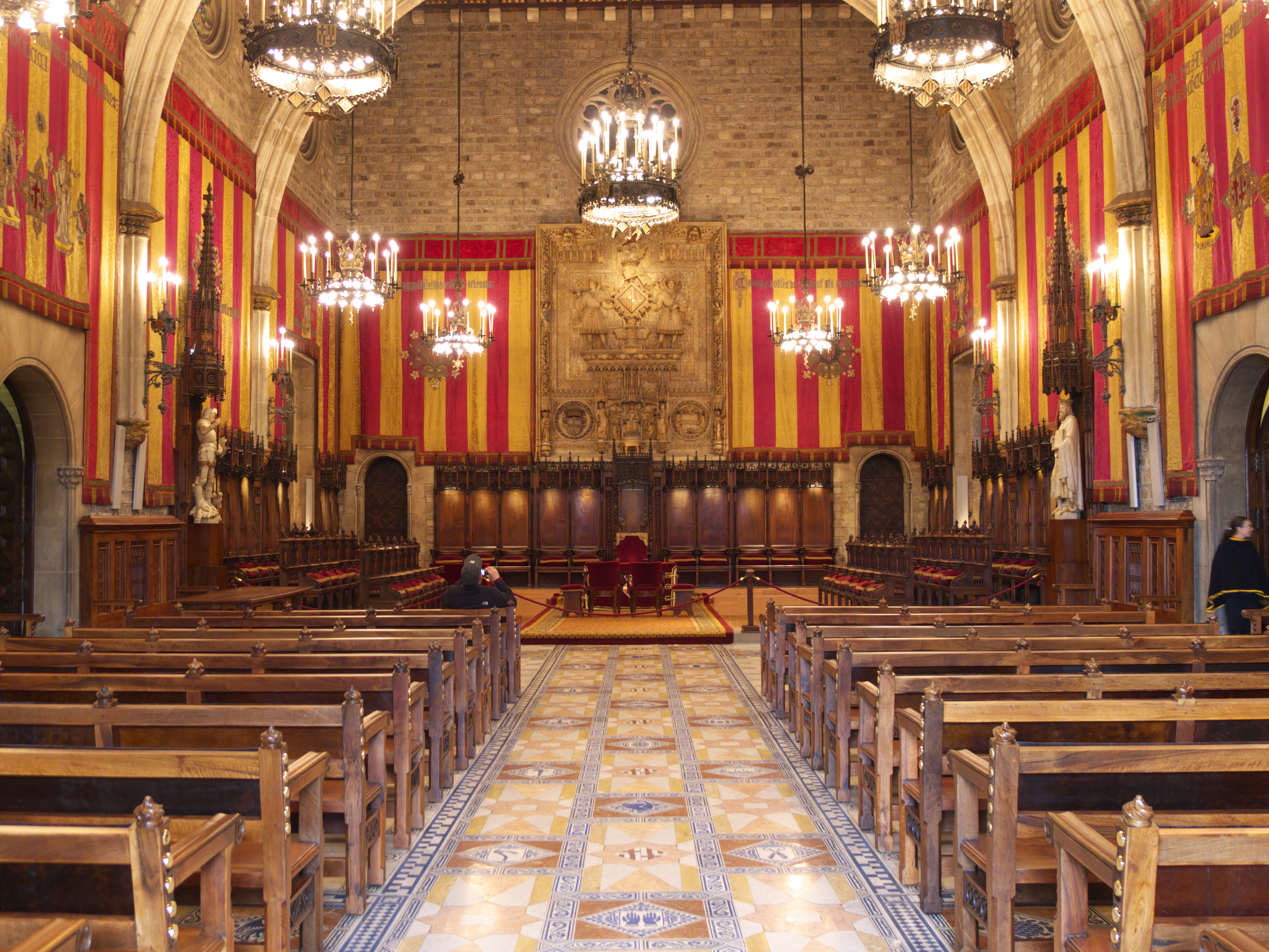 Pedro Llobet (s. XIV)